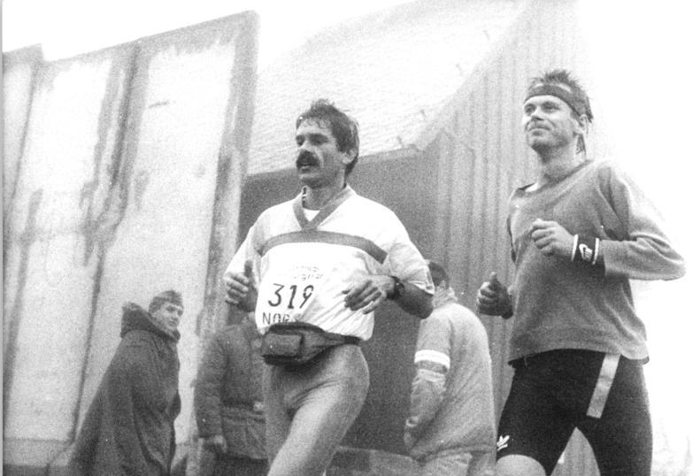 ADN-Kluge-8.9.90- Bez. Magdeburg-Brockenlauf- Seine dritte Geburt erlebte am Wochenende der Brockenlauf. Die 26 Kilometer lange, kräftezehrende Distanz von Ilsenburg über den höchsten Harzgipfel und zurück nach Ilsenburg nahmen insgesamt 462 Läuferinnen in Angriff. Im dichten Nebel passierten die Teilnehmer den Grenzzaun und sowjetische Posten auf dem 1.142 Meter hohen Brocken.